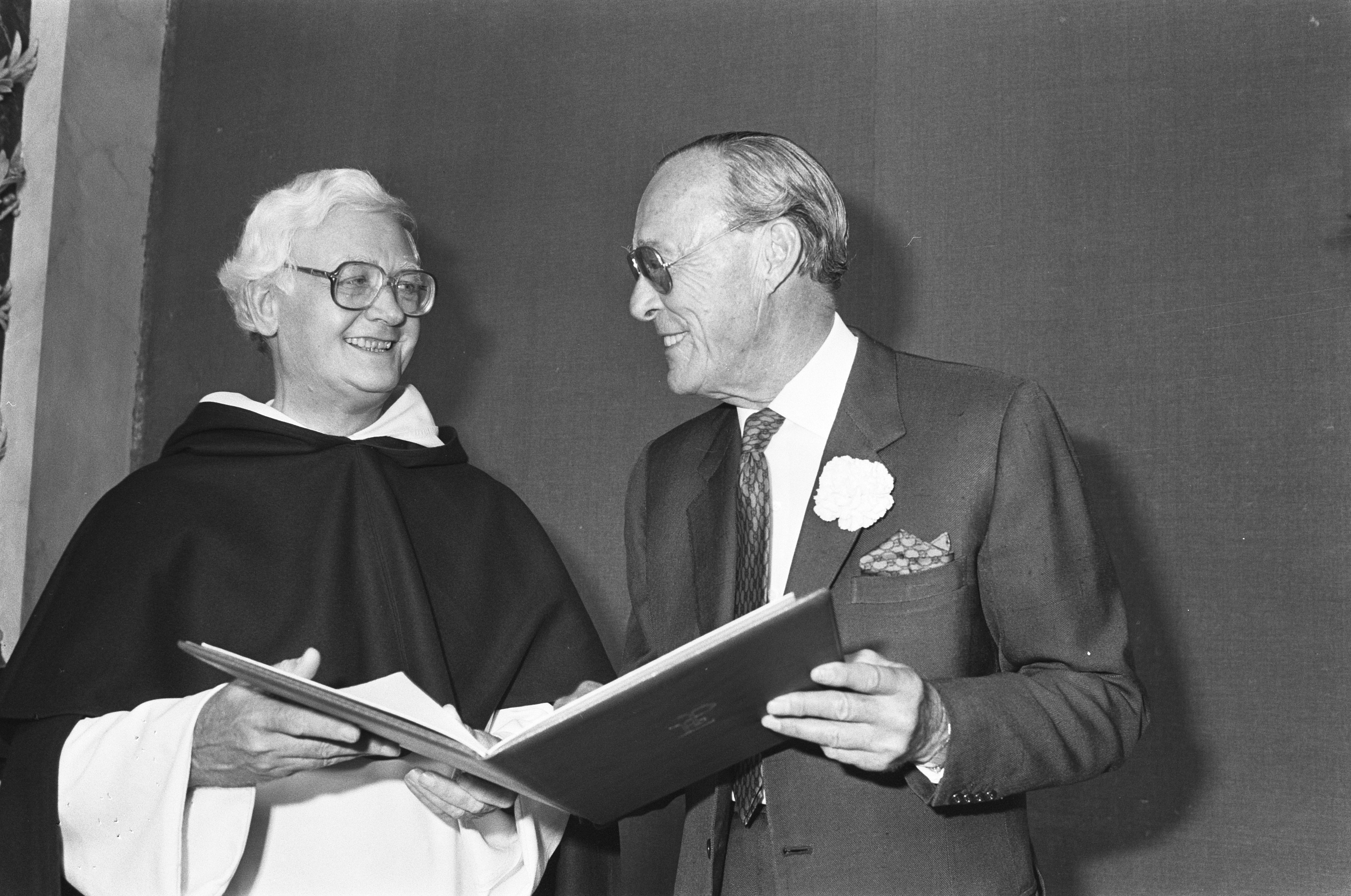 Collectie / Archief : Fotocollectie Anefo Reportage / Serie : Uitreiking van de Erasmusprijs aan theoloog Prof. Schillebeeckx Beschrijving : Prof. Schillebeeckx en prins Bernhard Datum : 17 september 1982 Trefwoorden : prijzen, prinsen, theologen, toga's, uitreikingen Persoonsnaam : Bernhard (prins Nederland), Schillebeeckx, Edward Fotograaf : Antonisse, Marcel / Anefo Auteursrechthebbende : Nationaal Archief Materiaalsoort : Negatief (zwart/wit) Nummer archiefinventaris : bekijk toegang 2.24.01.05 Bestanddeelnummer : 932-3303